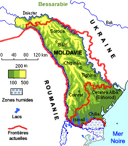 Bessarabie.jpg